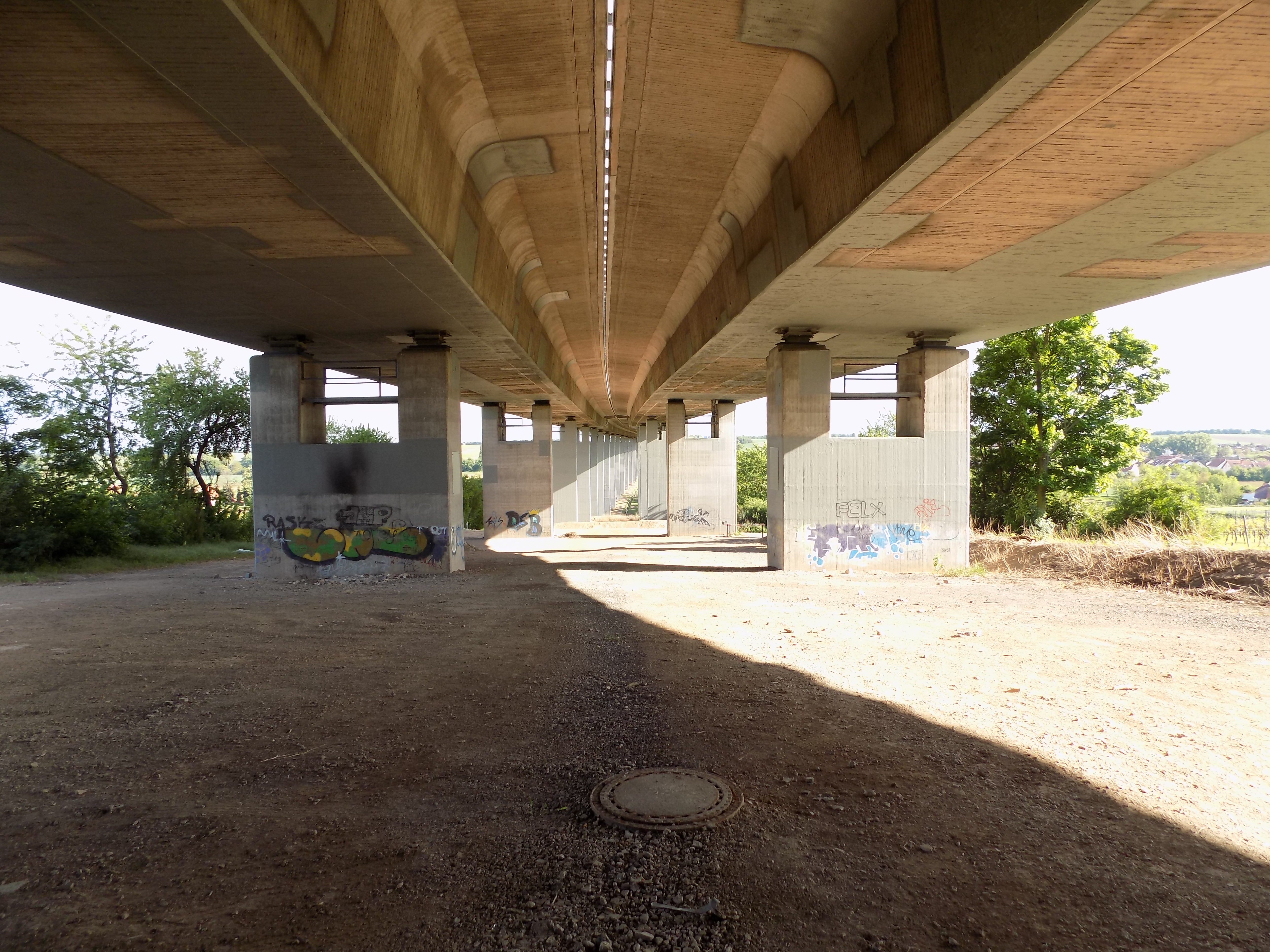 Talbrücke Pfeddersheim Unterbau